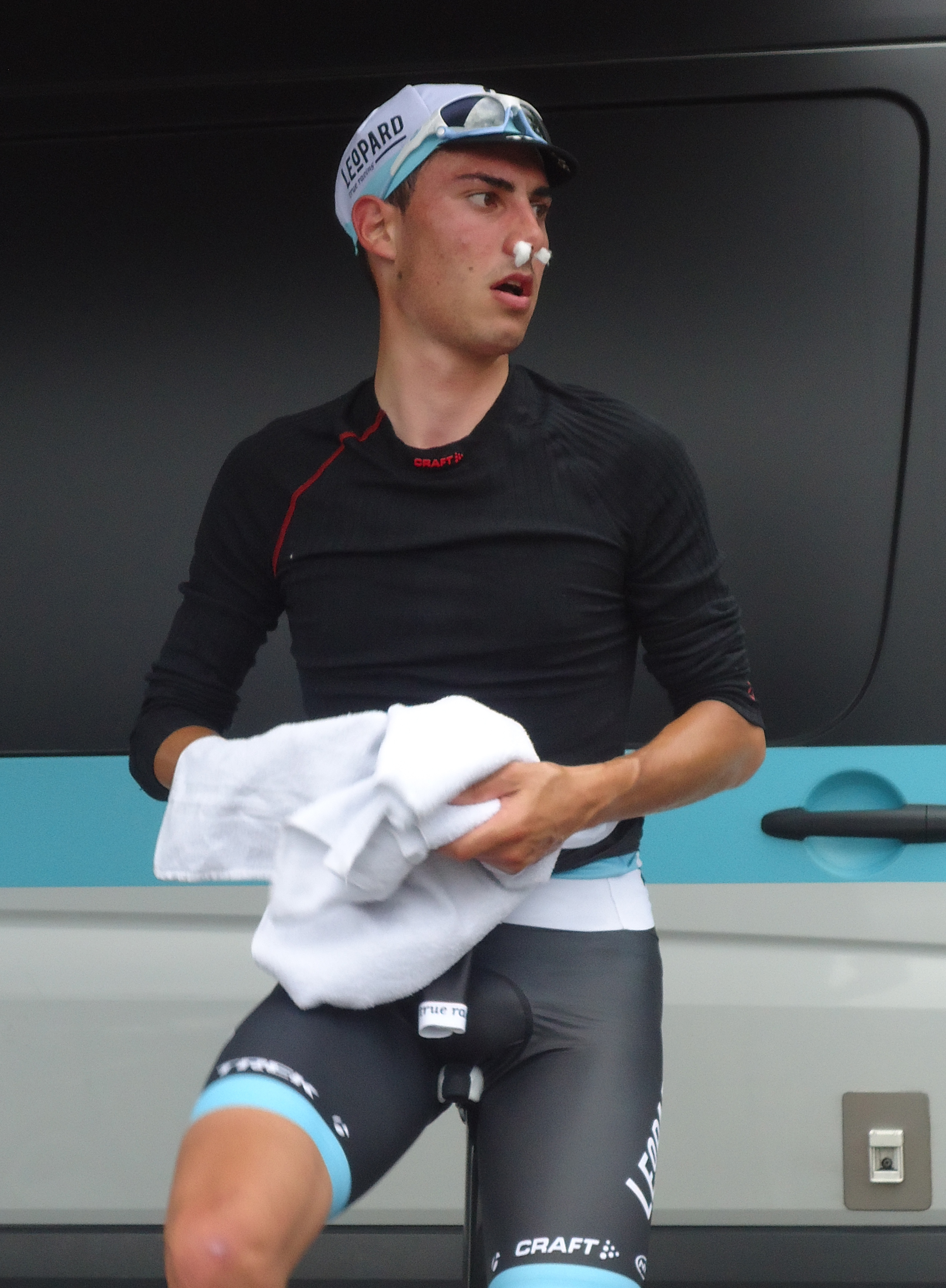 Jesus lors des Boucle de la Mayenne 2012